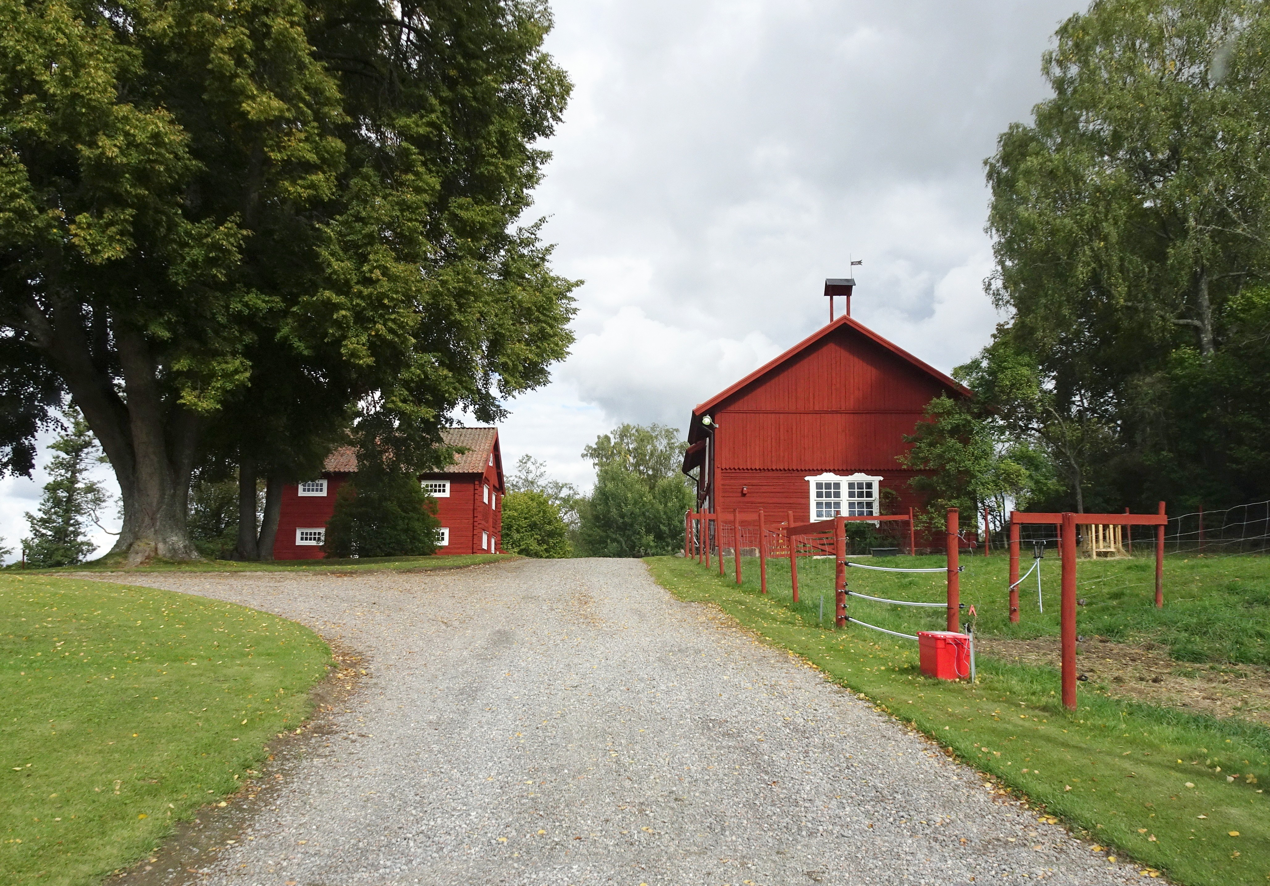 Herrökna gård, lada och magasin